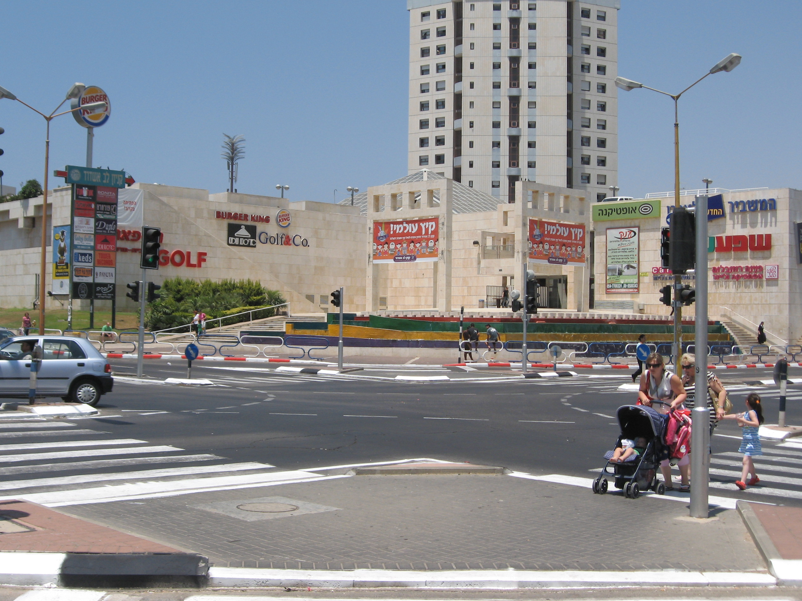 Lev asdod mall